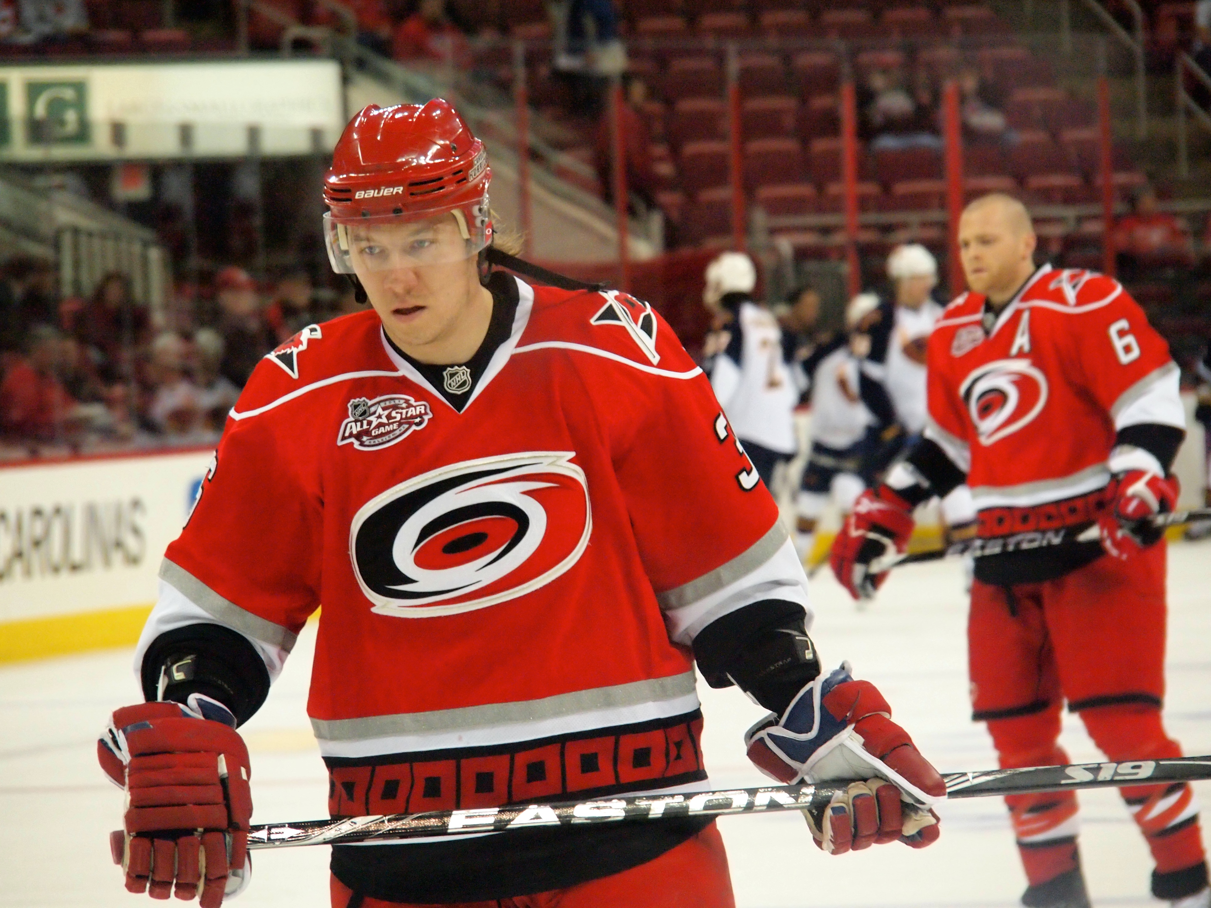 Jussi Jokinen